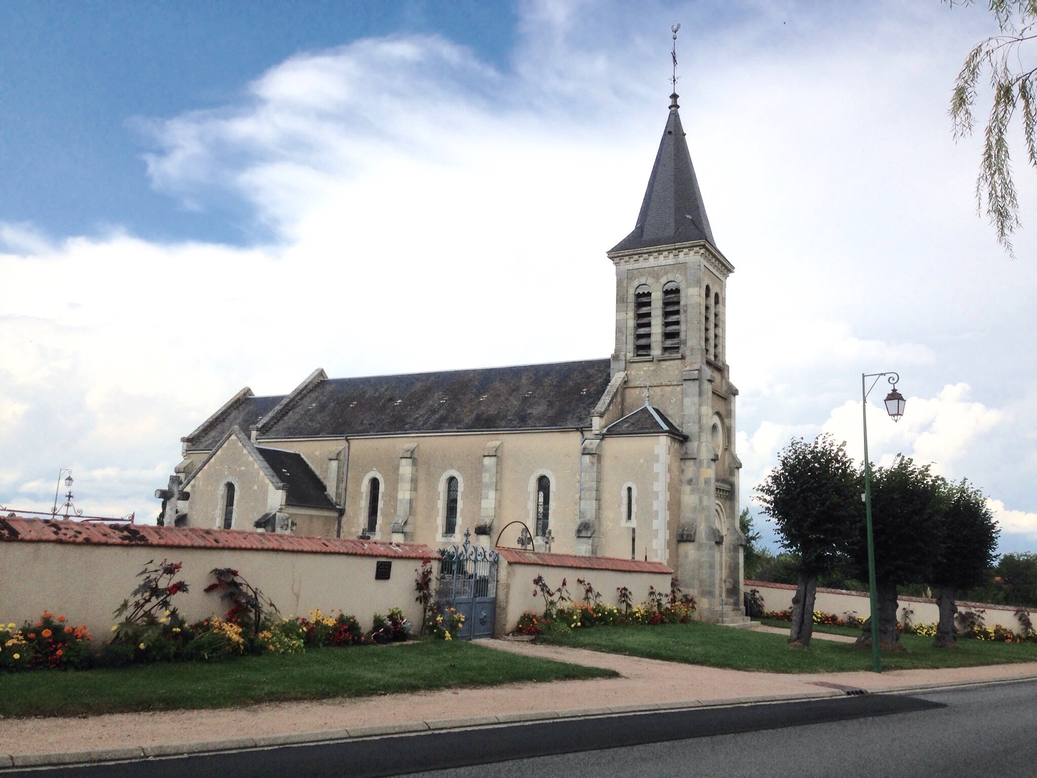 Église de Beddes (Cher)